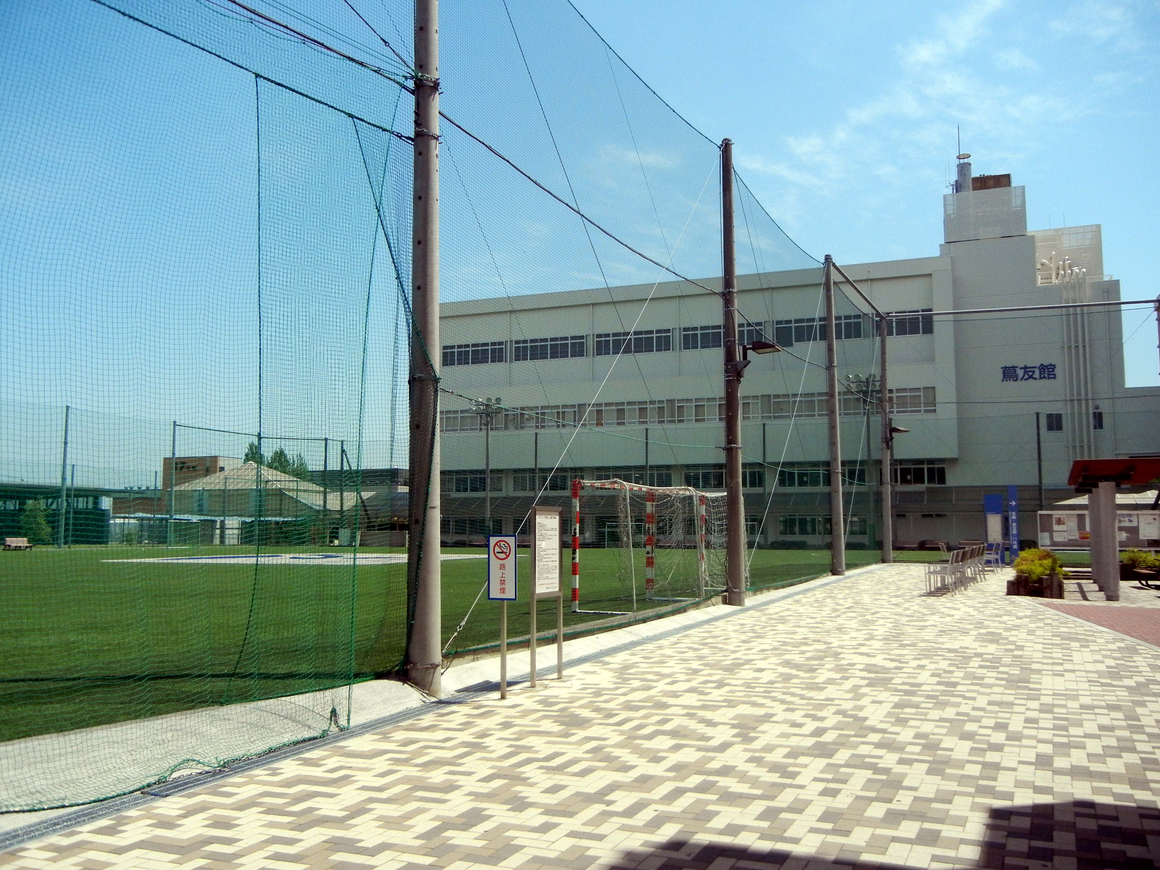 帝京大学八王子キャンパス第一グラウンド 蔦友館